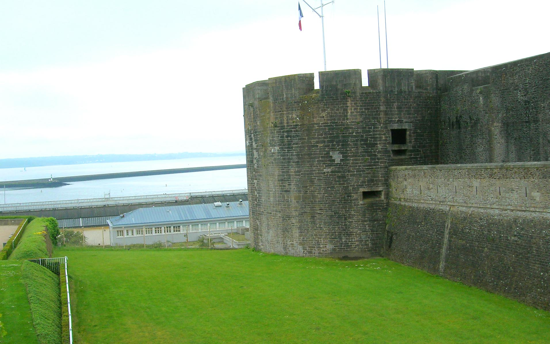 Buerg vu Brest (2006).